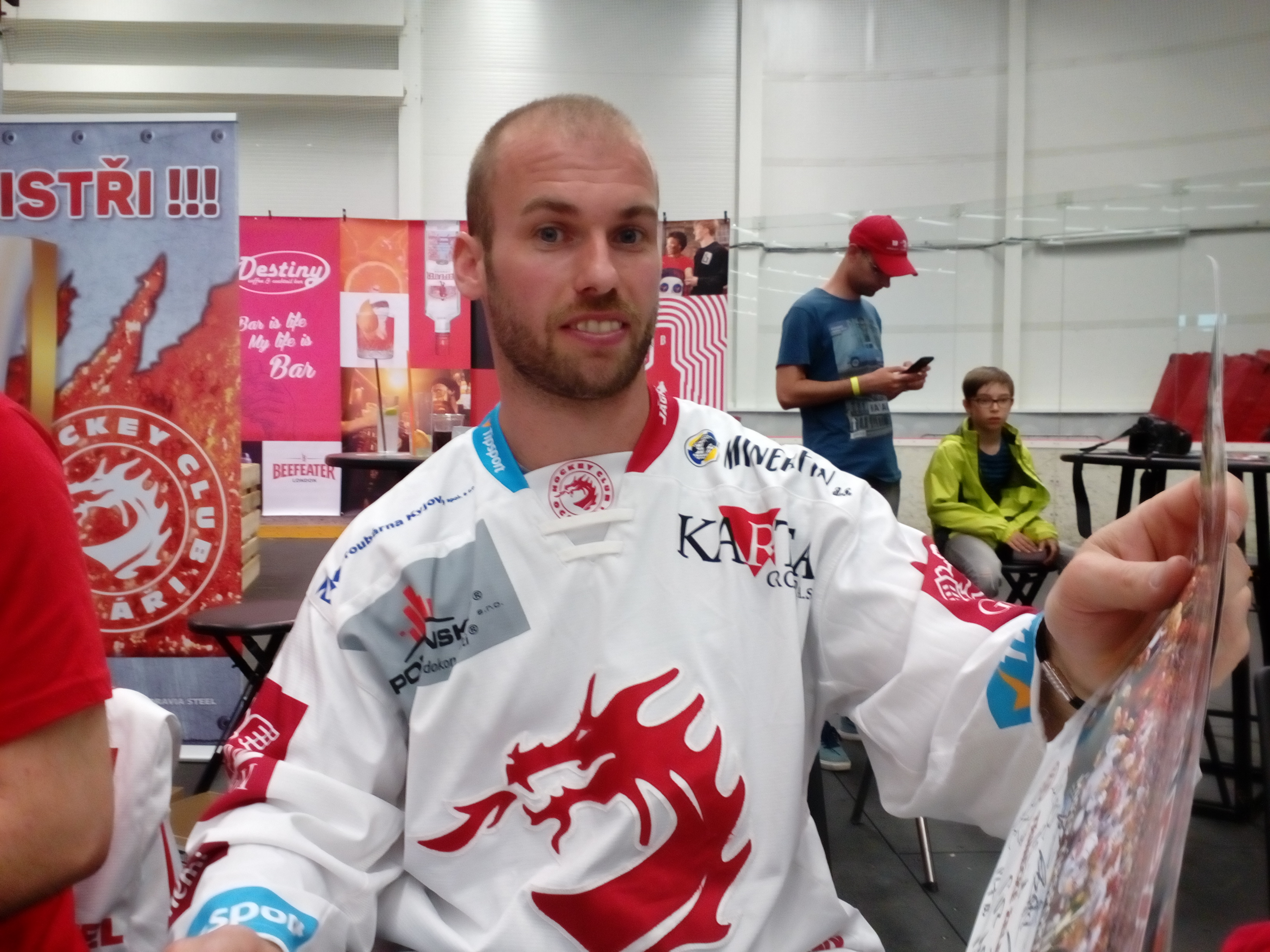 Po zakončení sezóny 2018/19 na autogramiádě v malé (tréningové) Werk Areně